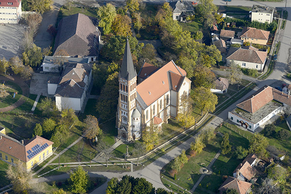 A római katolikus templom légi felvételen